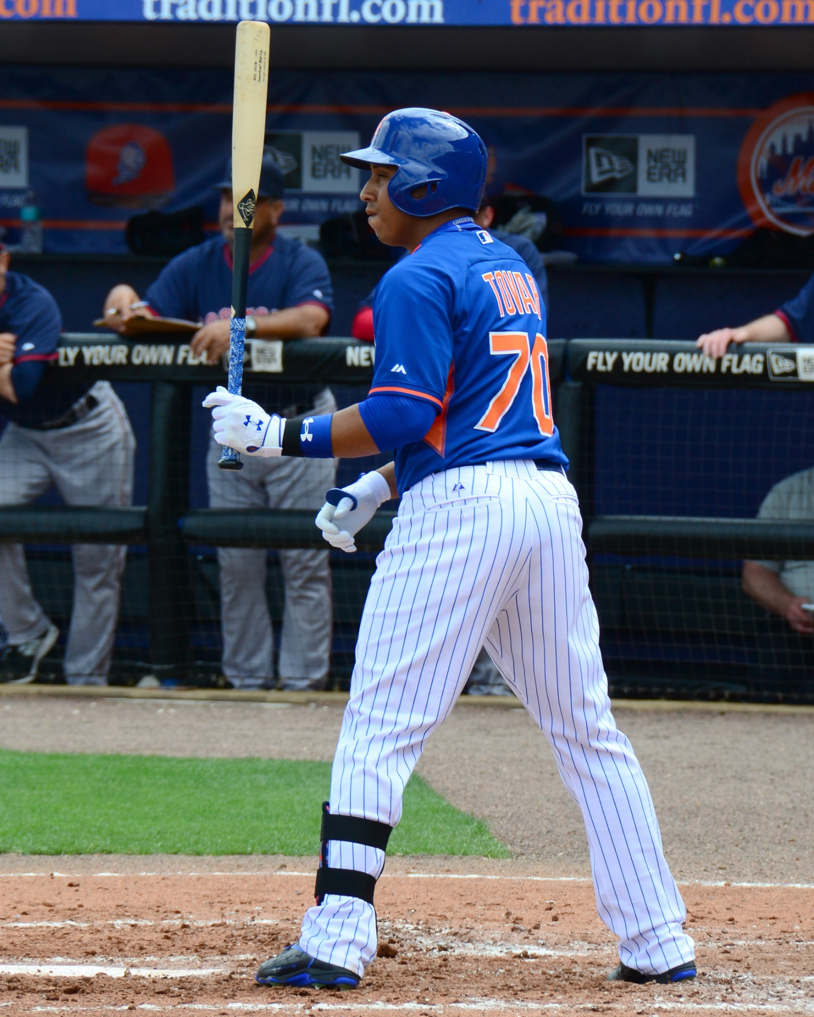 Wilfredo Tovar